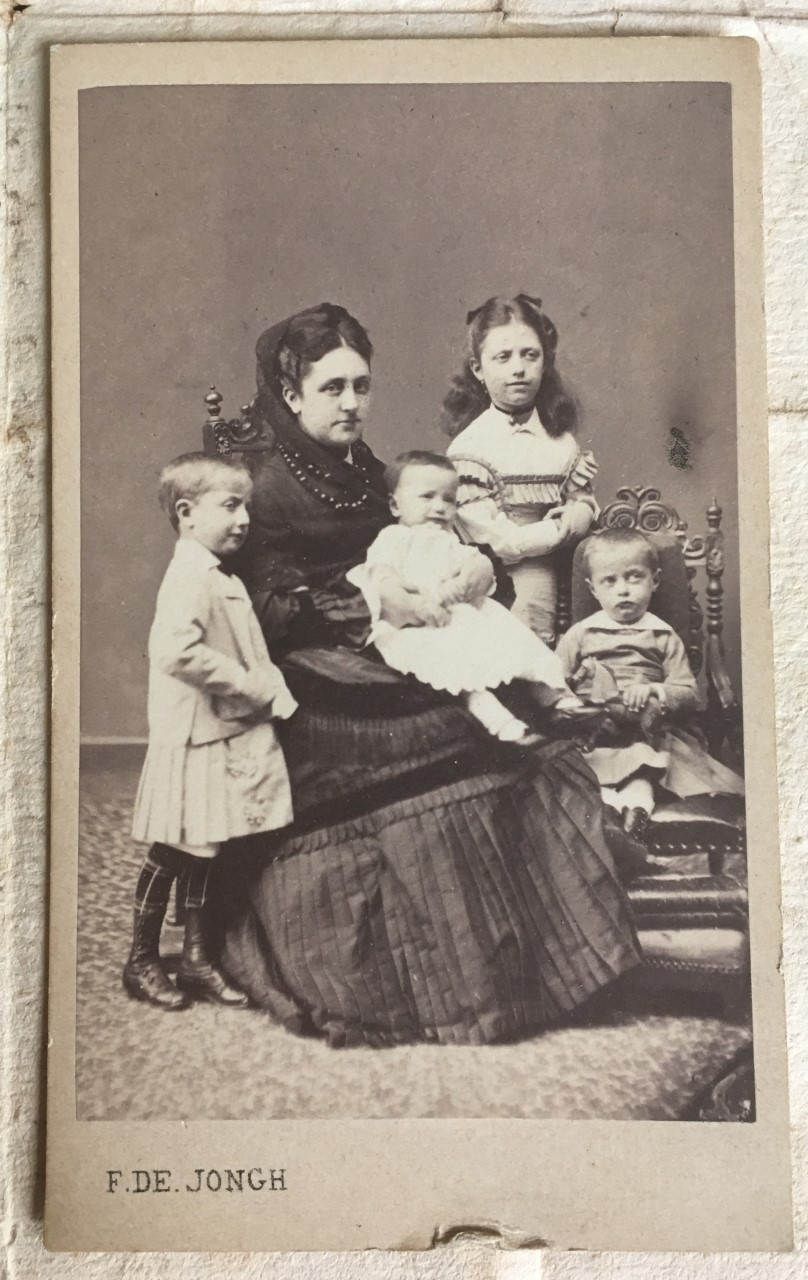 Margarita Fortuny y Veri, con sus hijos, Margarita, Esteban, Carlos (en brazos) y Joaquín, en Vevey hacia octubre de 1870, fotografiados por Francis de Jongh